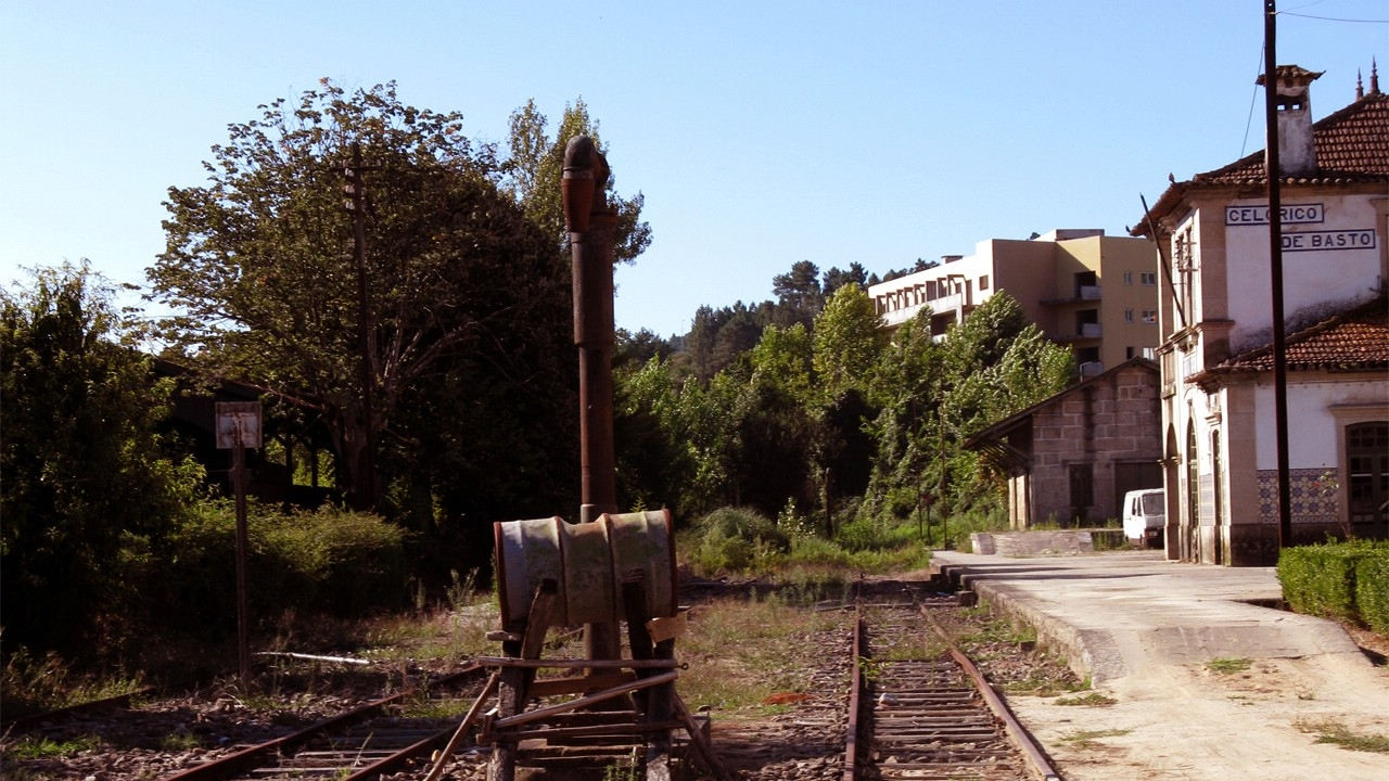 Vista geral da estação de Celorico. Foto tirada junto ao depósito de água